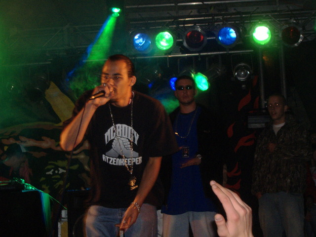 Smoky; Konzertfoto